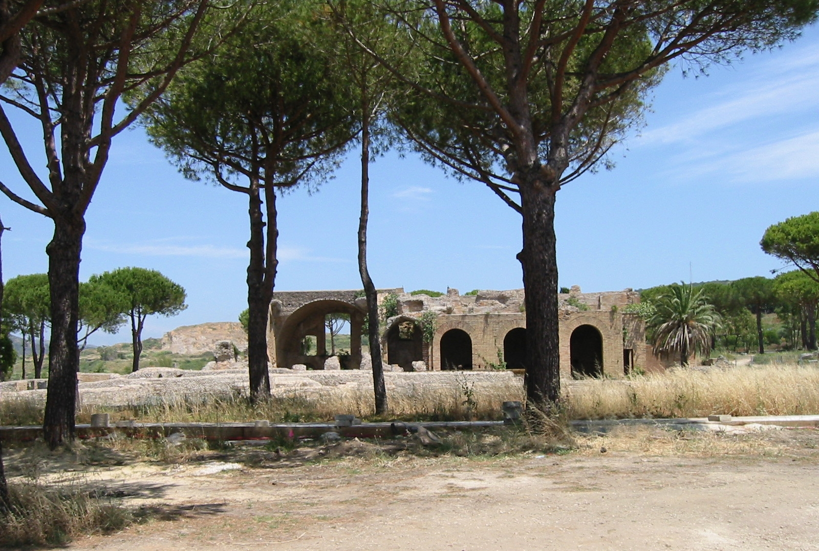 The Terme Taurine near Civitavecchia (the roman Centumcellae) in Lazio in Italy